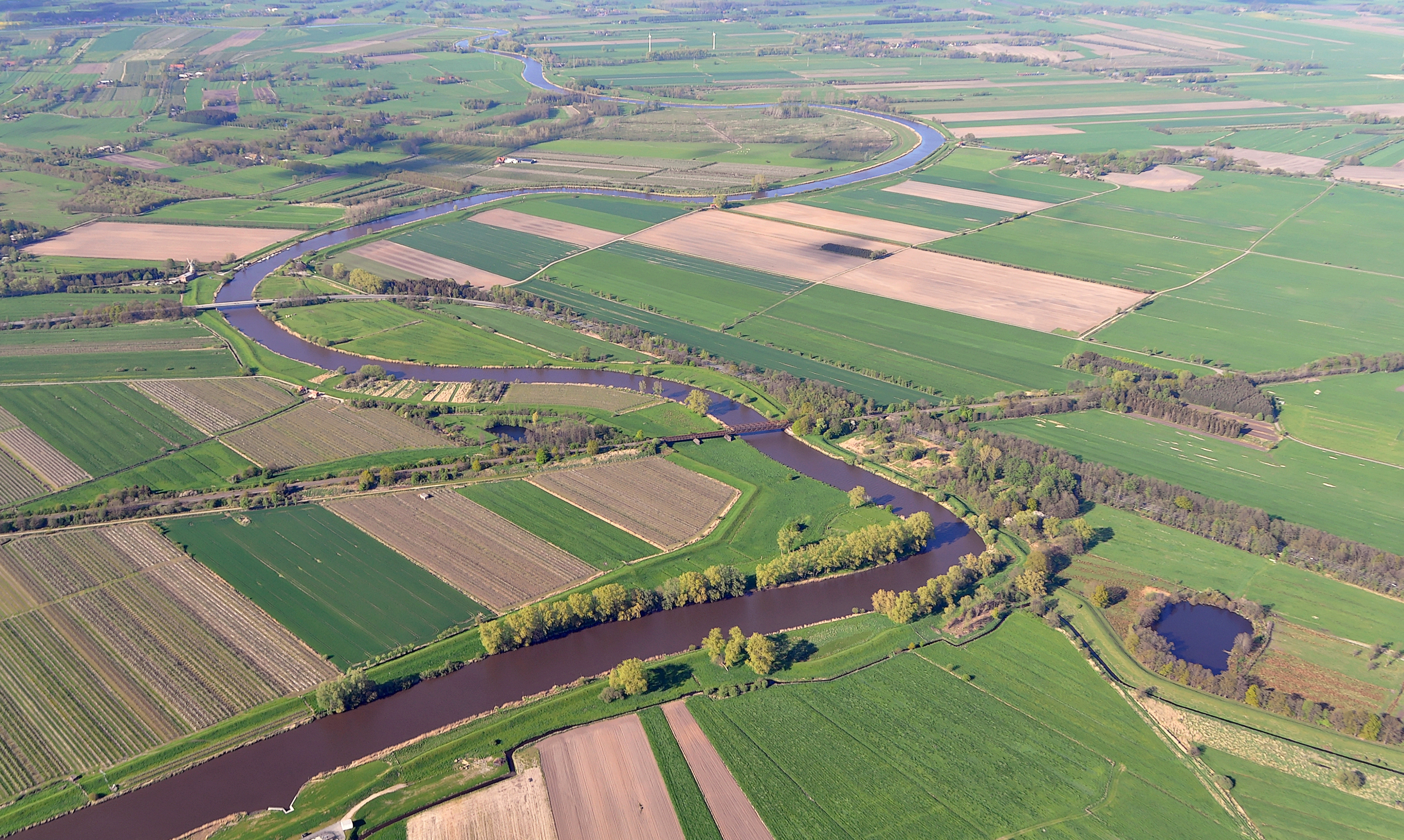 Luftbilder von der Nordseeküste 2012-05